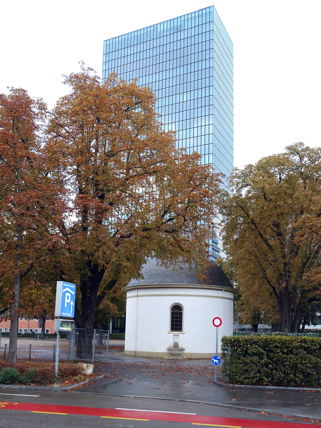 Rosental Anlage. Die ehemalige Abdankungshalle des Basler Friedhofs St. Theodor, wurde 1832 von Melchior Berri (1801–1854) erbaut